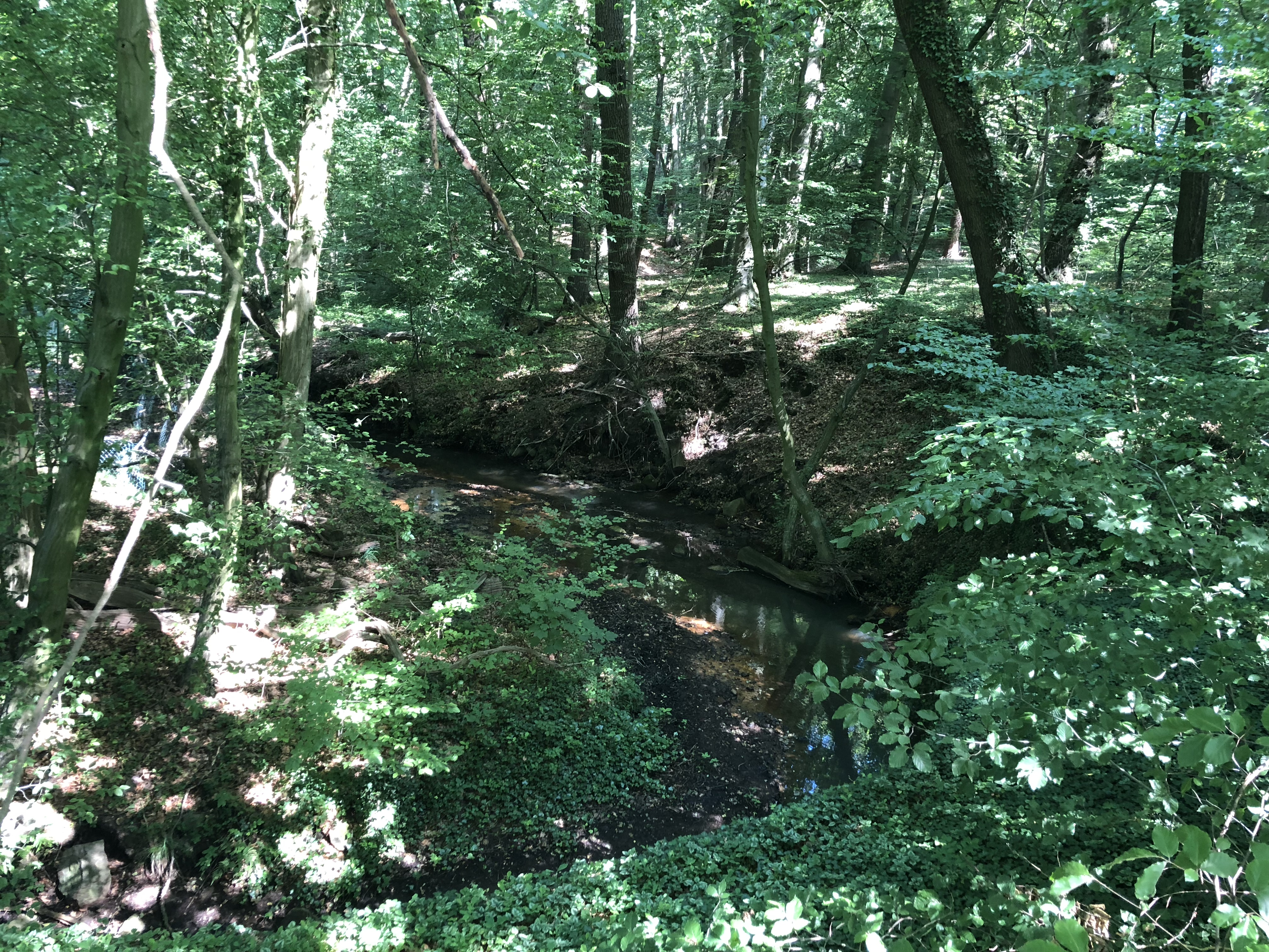 De Steenbeek bi Rutenbeek